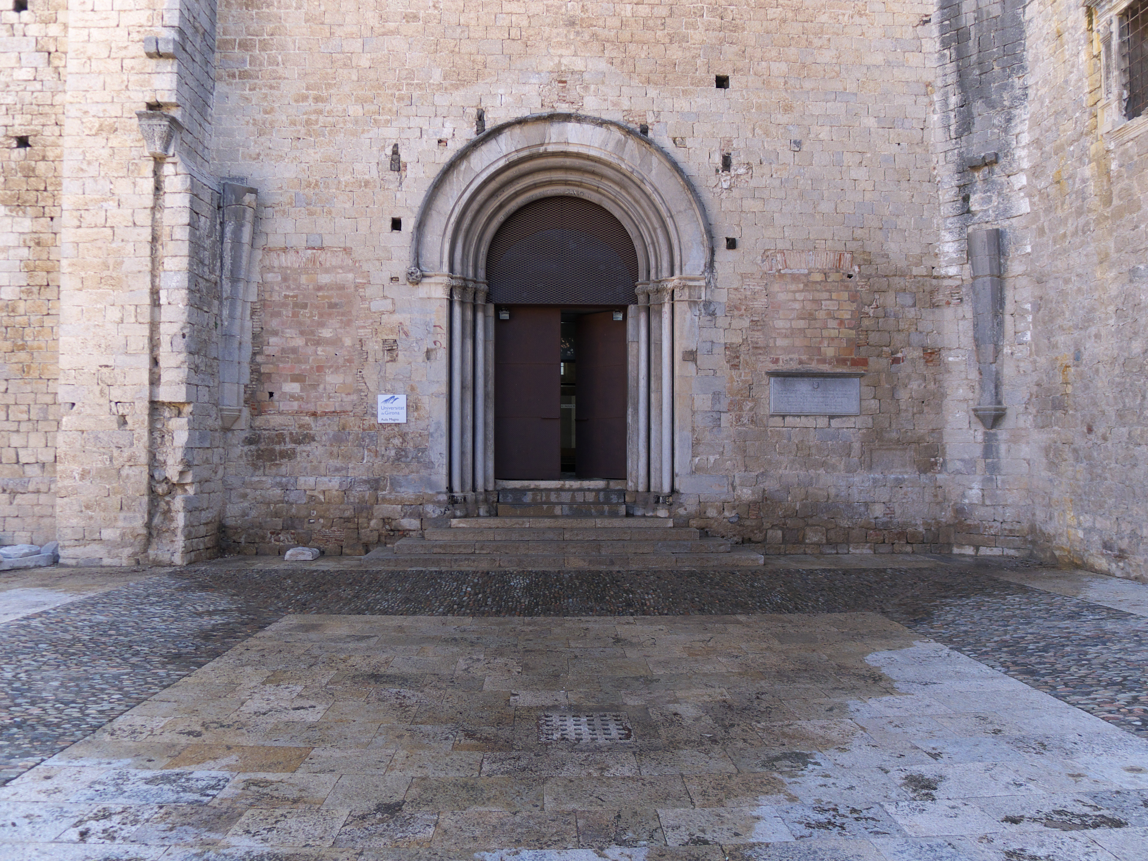 Fachada occidental de la iglesia. Se observa el arranque de la arcada de un tramo inacabado.